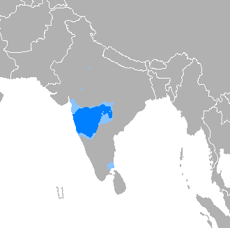 Donde es mayoritario Donde es minoritario